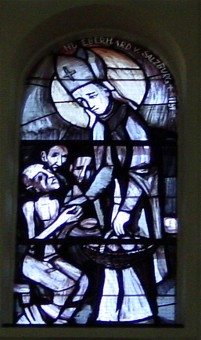 Kirchenfenster vom Heiligen Eberhard in der Pfarrkirche Liesing von Martin Häusle